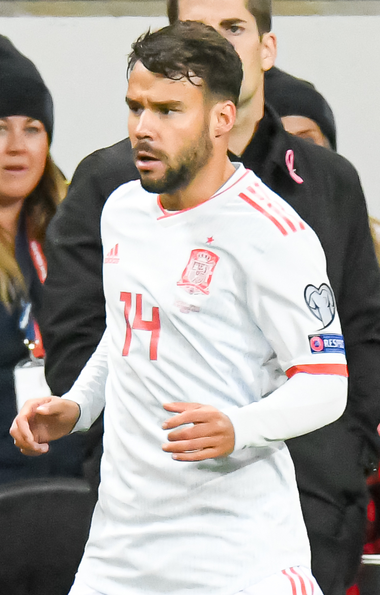 UEFA EURO qualifiers Sweden vs Spain 20191015